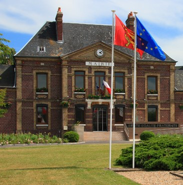 Hôtel de ville de Tourville-la-Rivière, place de la Commune de Paris.